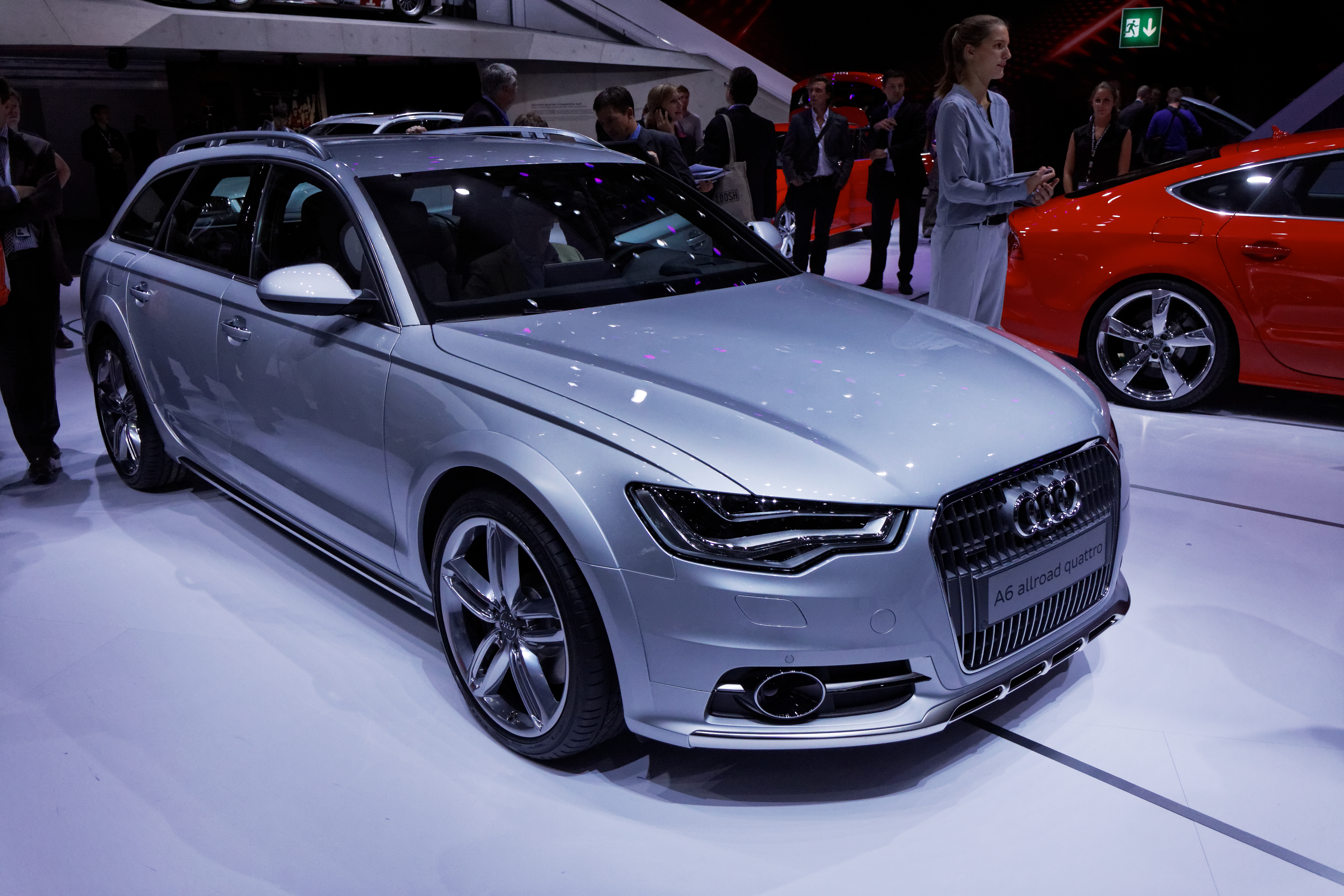 Une Audi A6 présentée lors du Mondial de l'Automobile de Paris 2012.